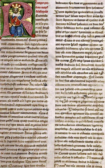 Miniatura krále Václava II. - Zbraslavská kronika f1v